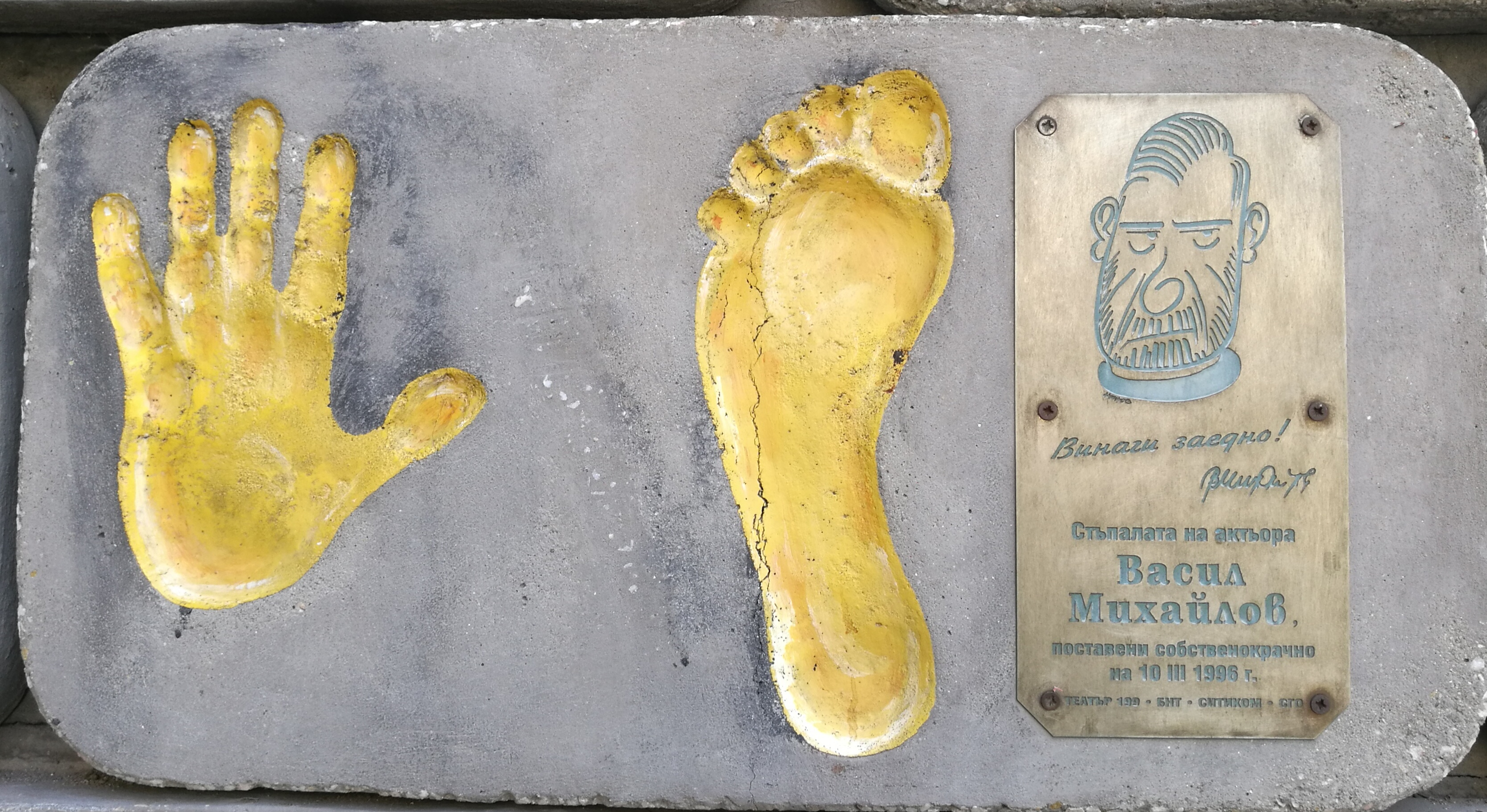 Стената на славата пред Театър 199 - пано с отпечатъци, послание и шарж на Васил Михайлов.